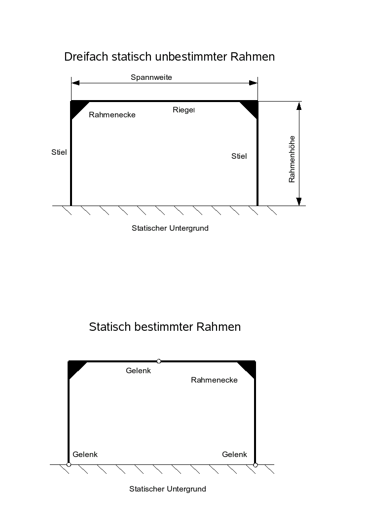 Schema zweier Rahmen im Bauwesen